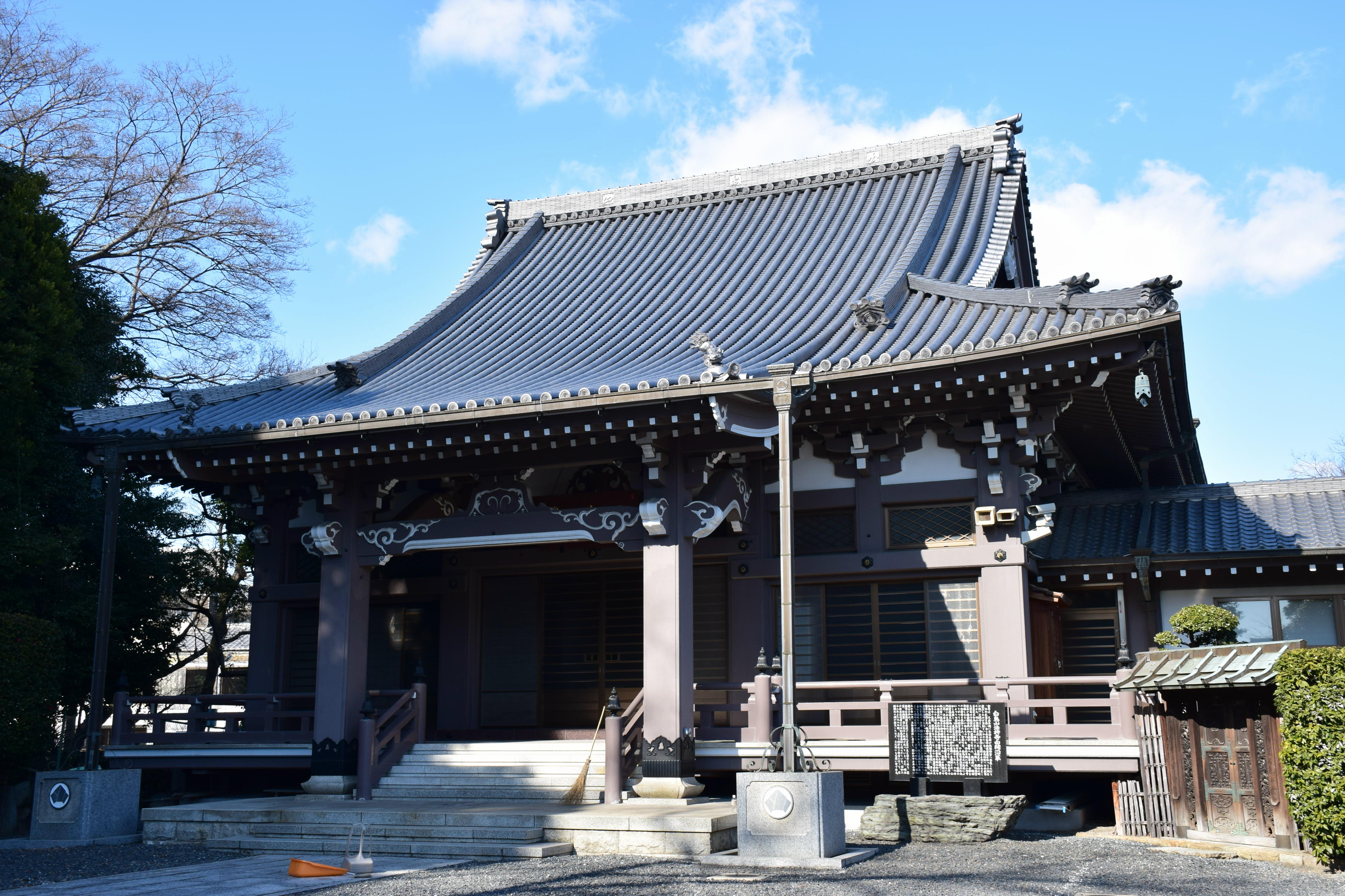 法持寺本堂